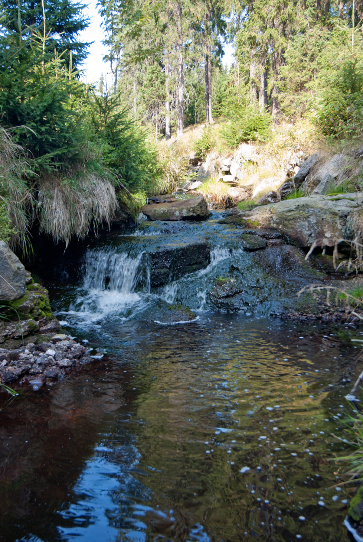 Bukový potok, Krušné hory, u bývalé obce Jelení